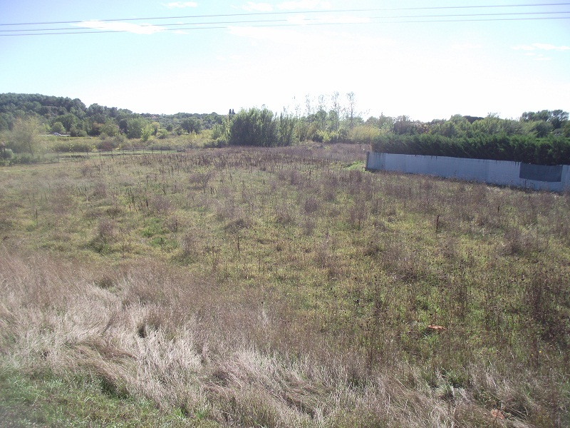 Mare du col de l'Ange 83.300 Draguignan France propriétés privées, en cours d'urbanisation.